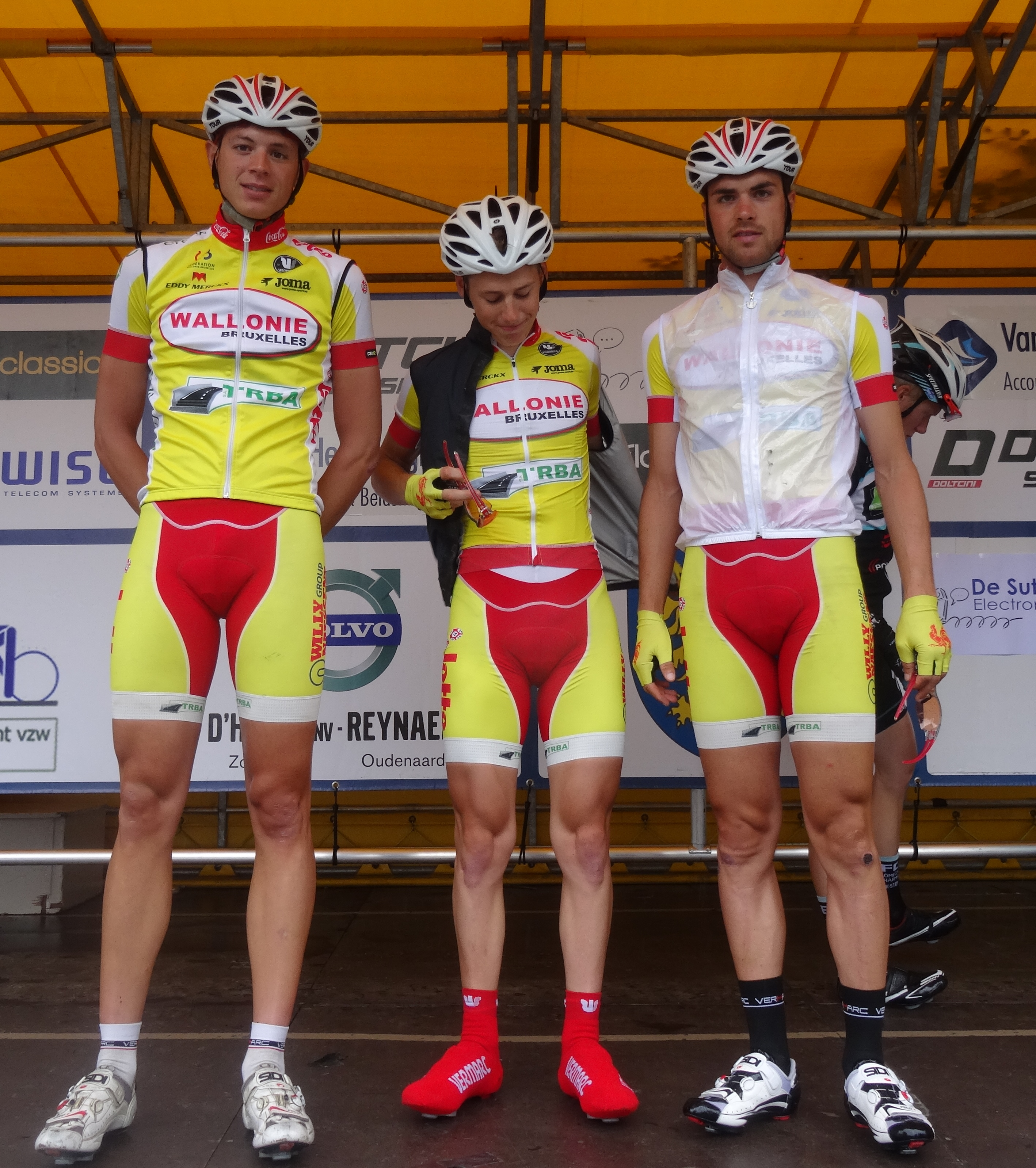 Reportage photographique réalisé le samedi 5 juillet à l'occasion du départ et de l'arrivée du Circuit Het Nieuwsblad espoirs 2014 à Grotenberge (Zottegem), Belgique.